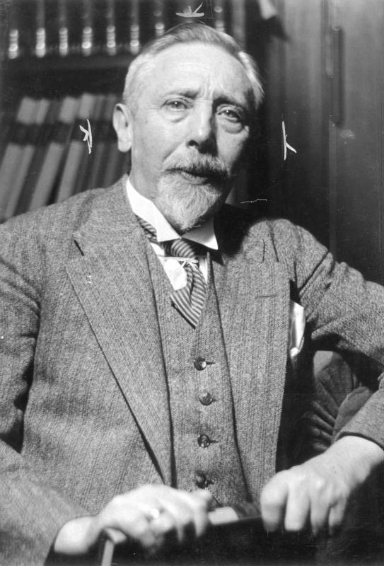 Geheimrat Prof. Hermann Oncken, 5033-33